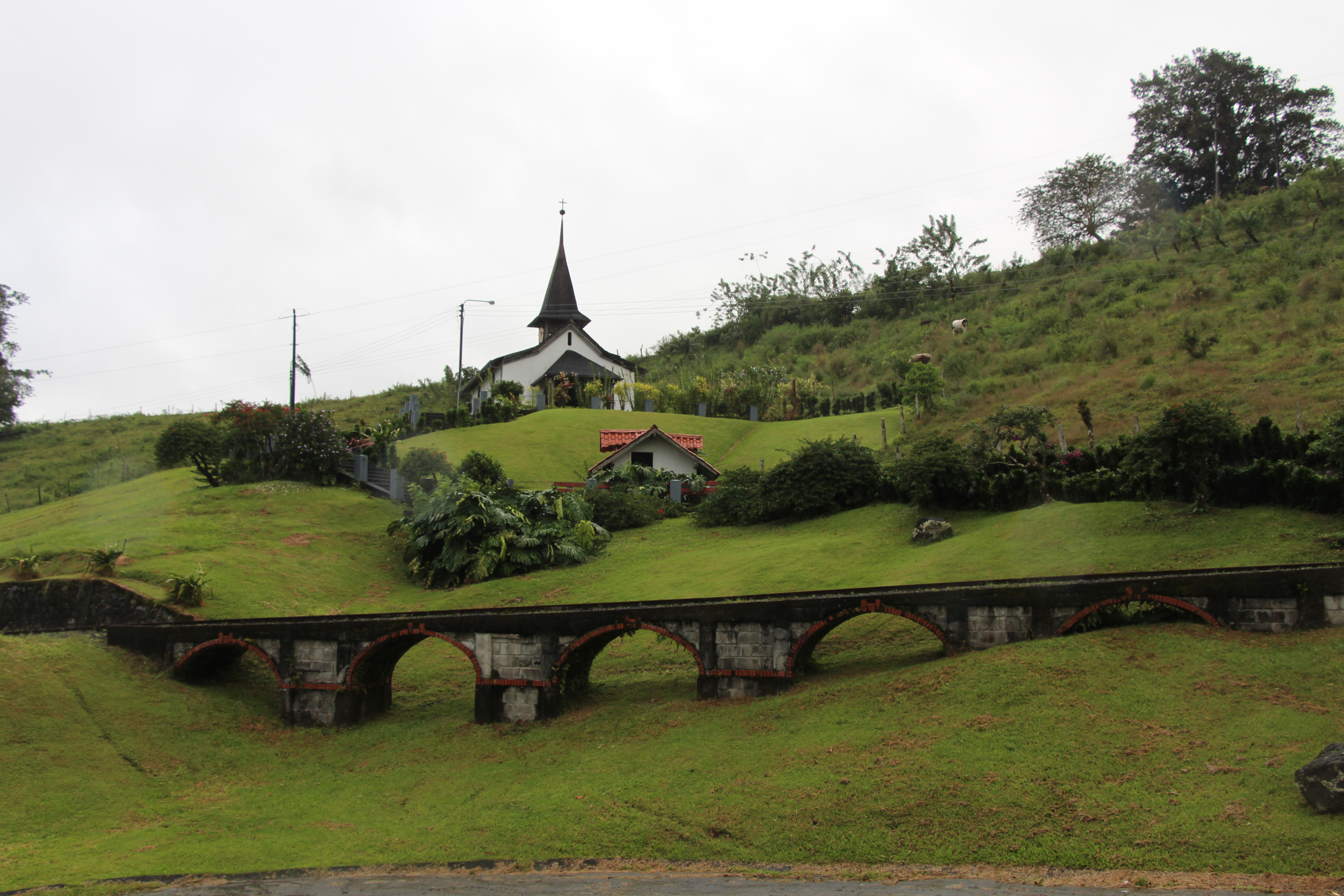 Bahntrasse kurz vor der Talstation mit der Kapelle im Hintergrund